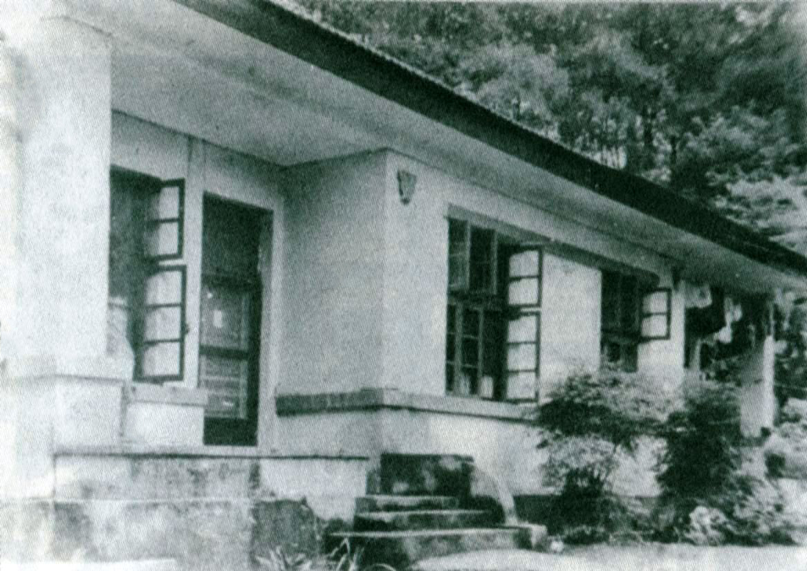 中文（中国大陆）: 此作品摄于1952，已过50年，进入公共领域。封面摄影作者不明。